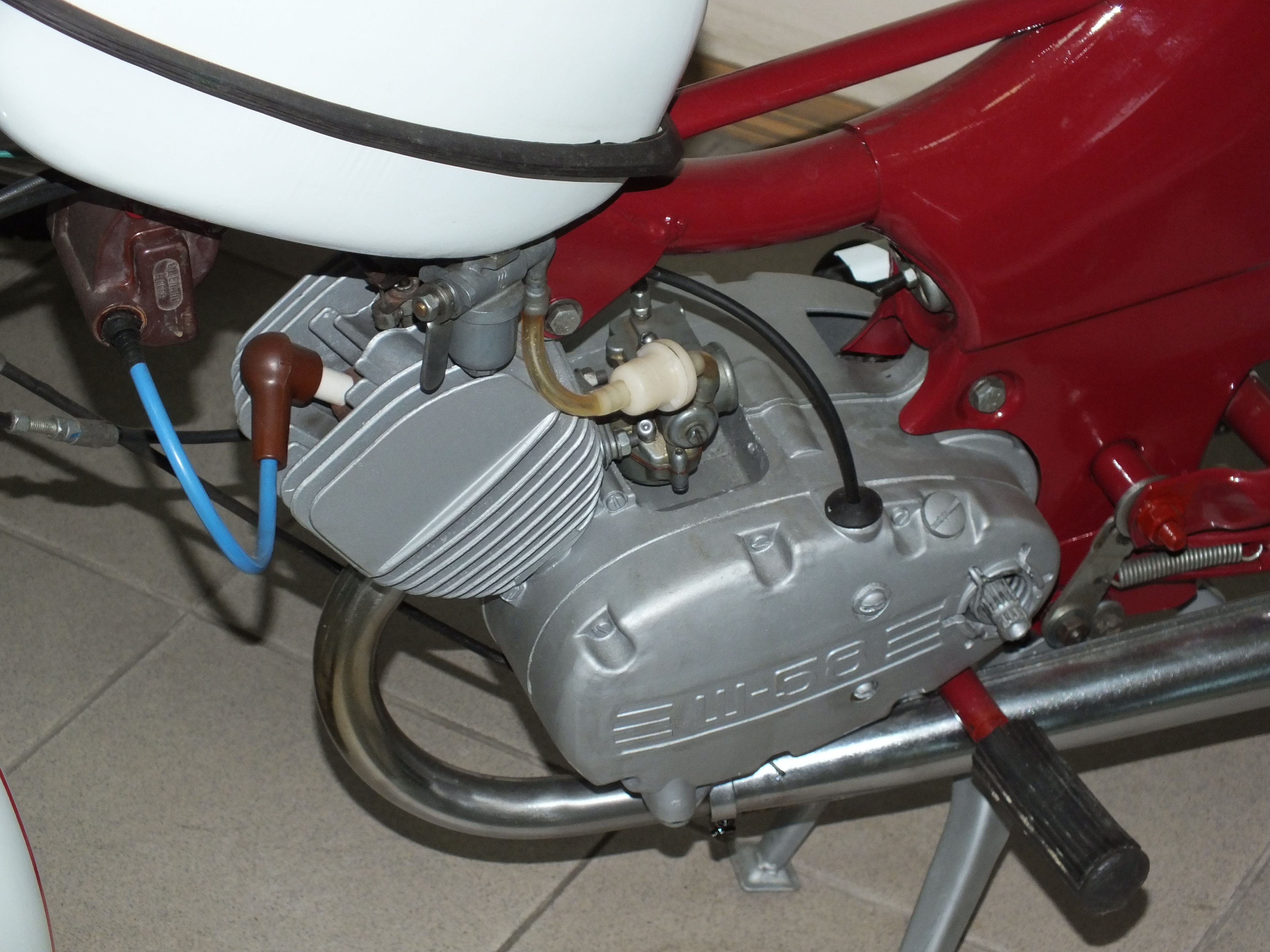 Мопеды "Рига"